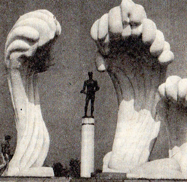 Pomnik Zwycięstwa w Poti.